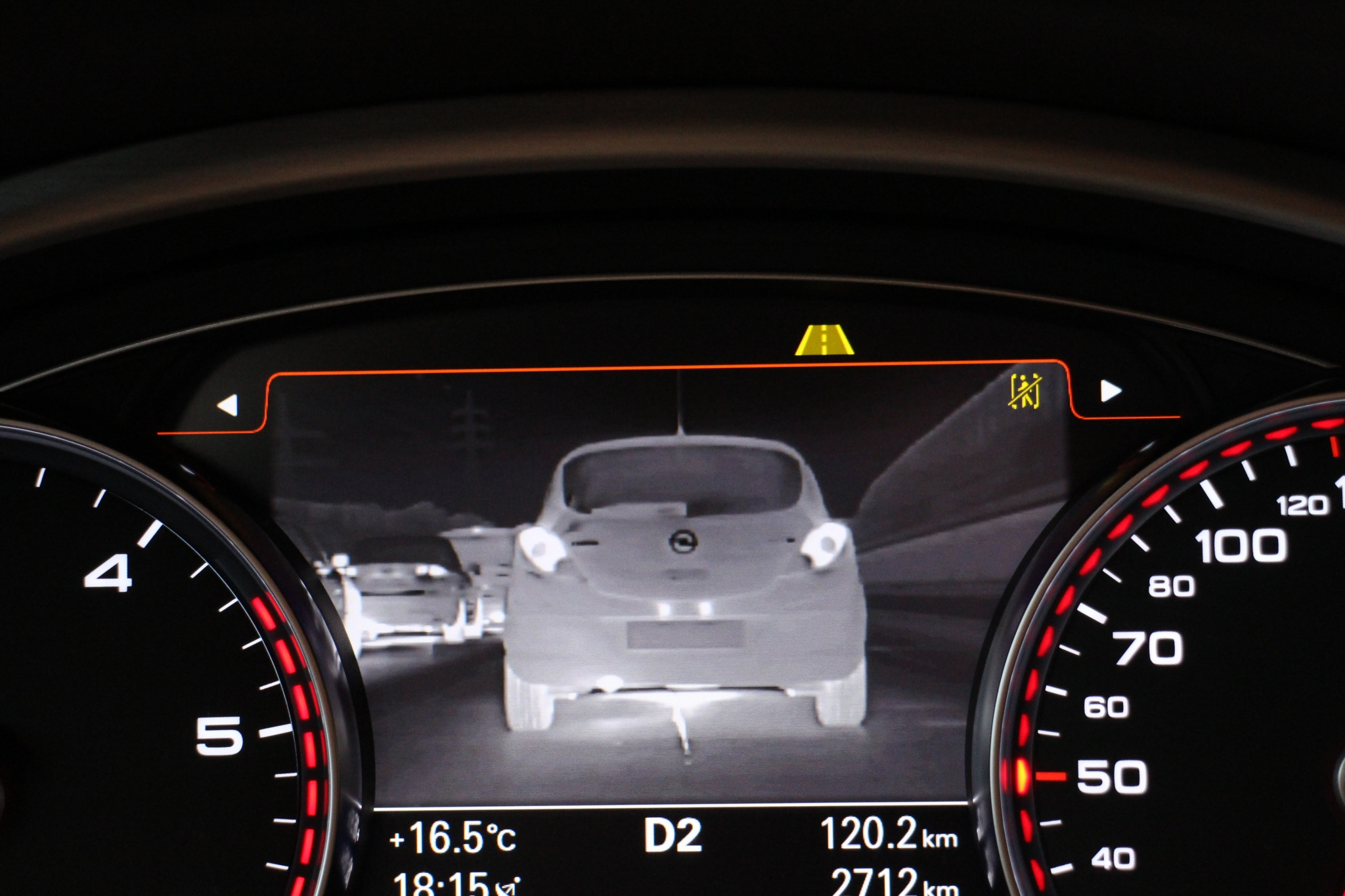 Facelift